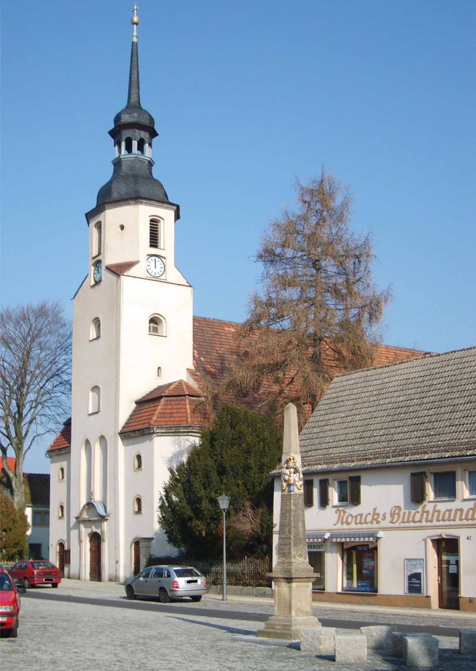 Die Kirche St. Katharina mit Postmeilensäule